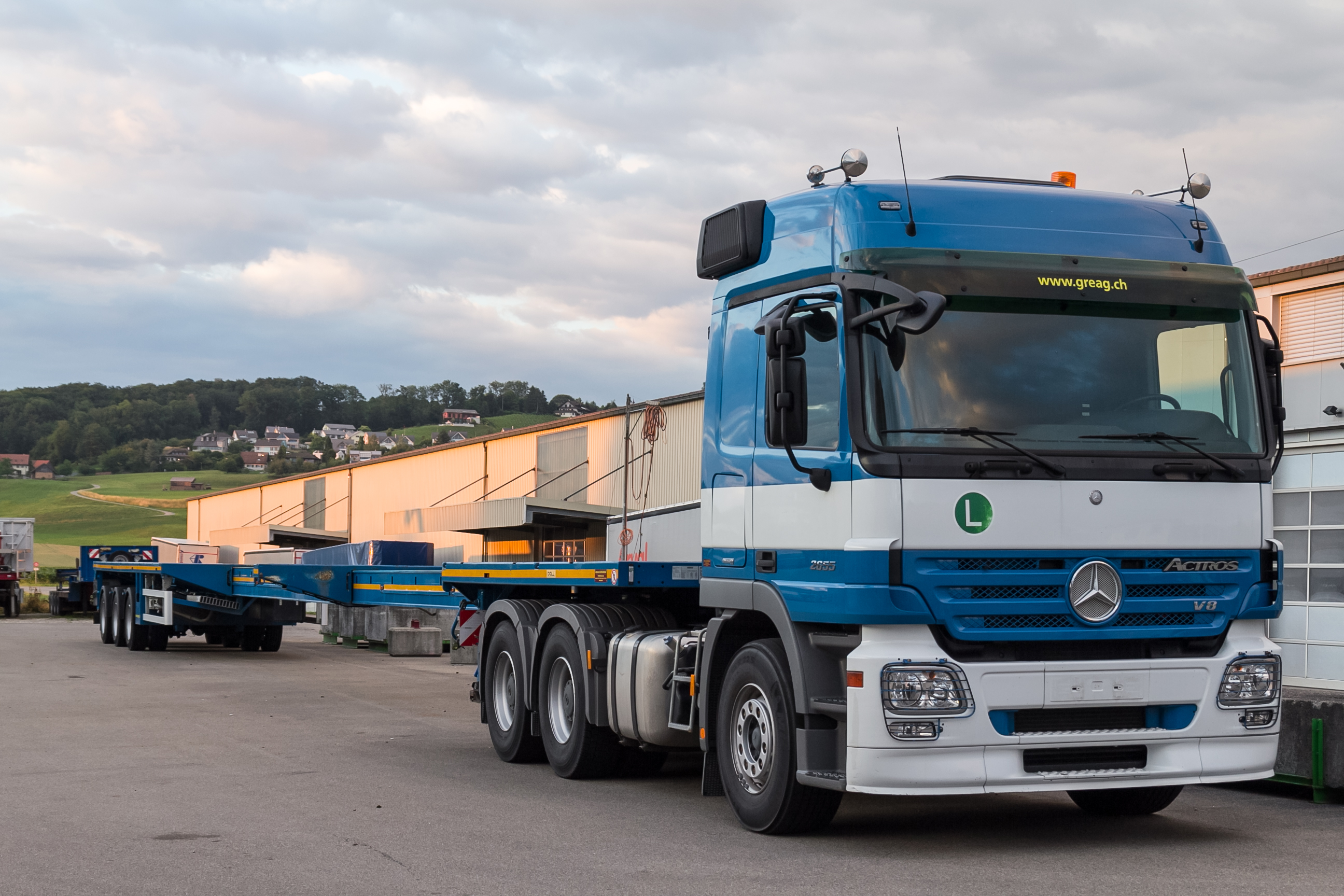 Mercedes-Benz Actros 2655 V8 Sattelzugmaschine